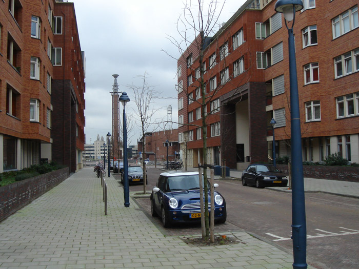 De Rheastraat in het Olympisch Kwartier met op de achtergrond de Marathontoren van het Olympisch Stadion op 13 januari 2007. Foto genomen door Daniel van der Ree.